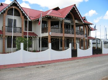 description: mairie de Montsinery auteur:didwin